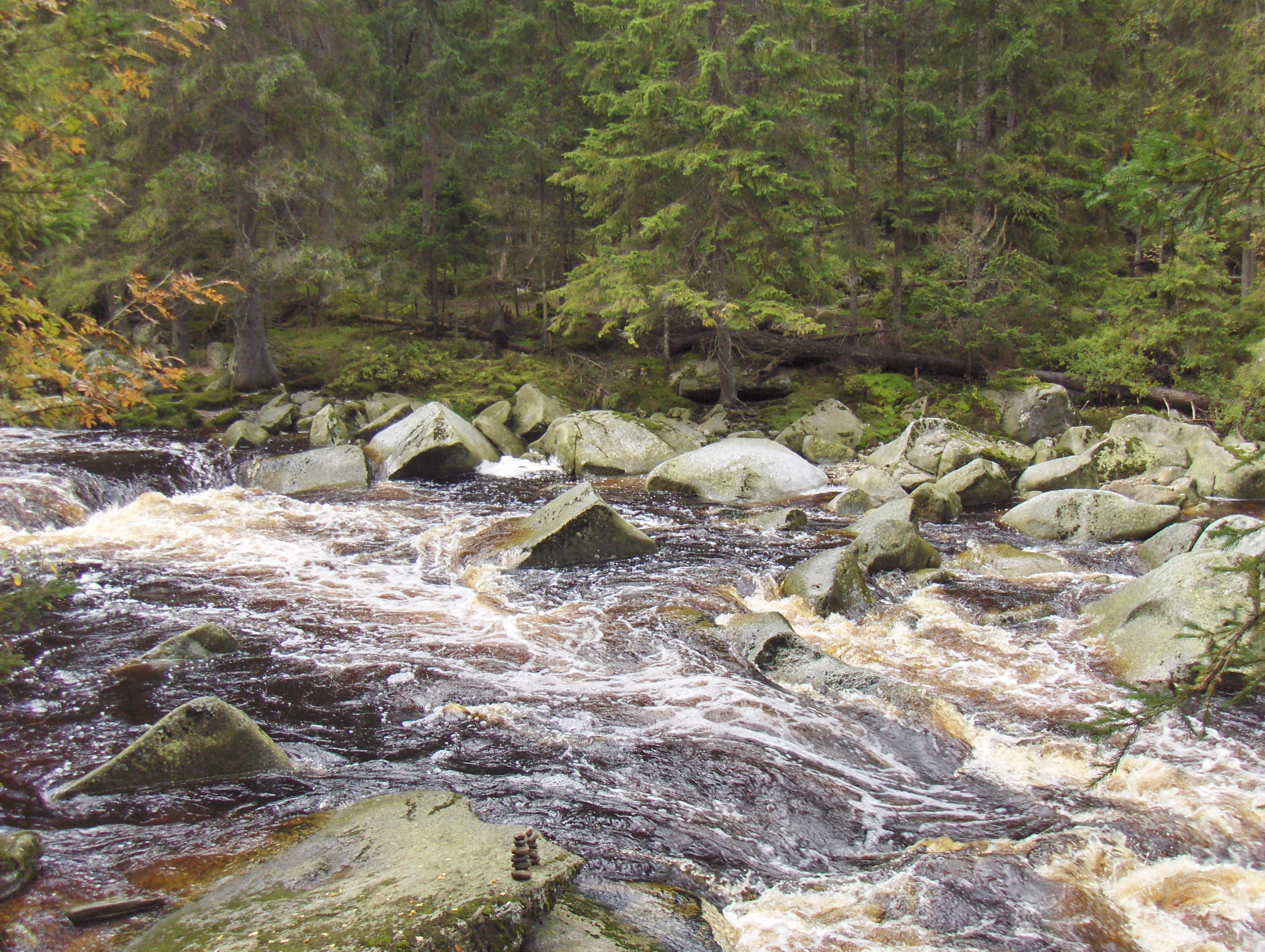 Šumava. Povydří